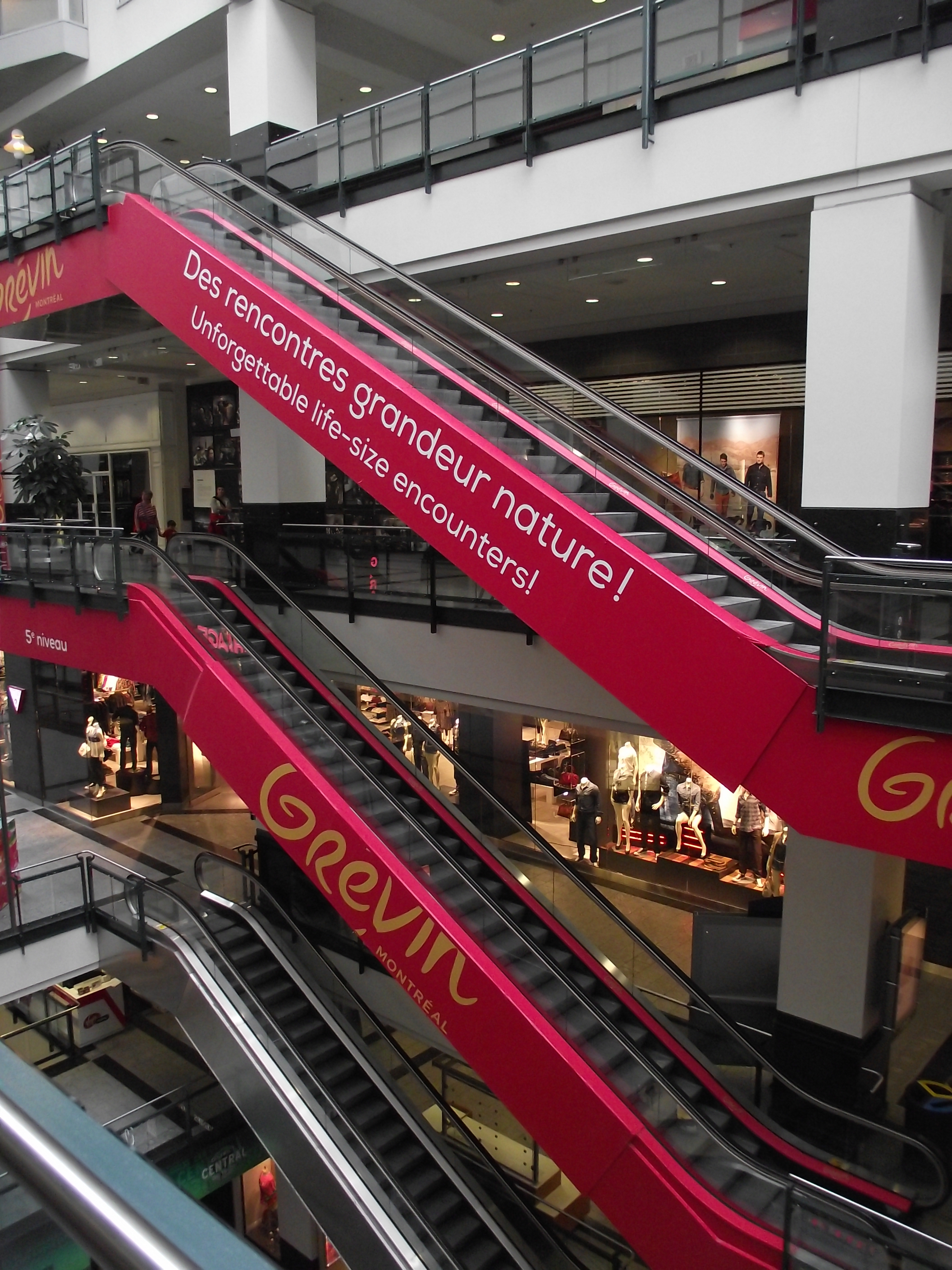 Accès au Musée Grévin Montréal, Centre Eaton